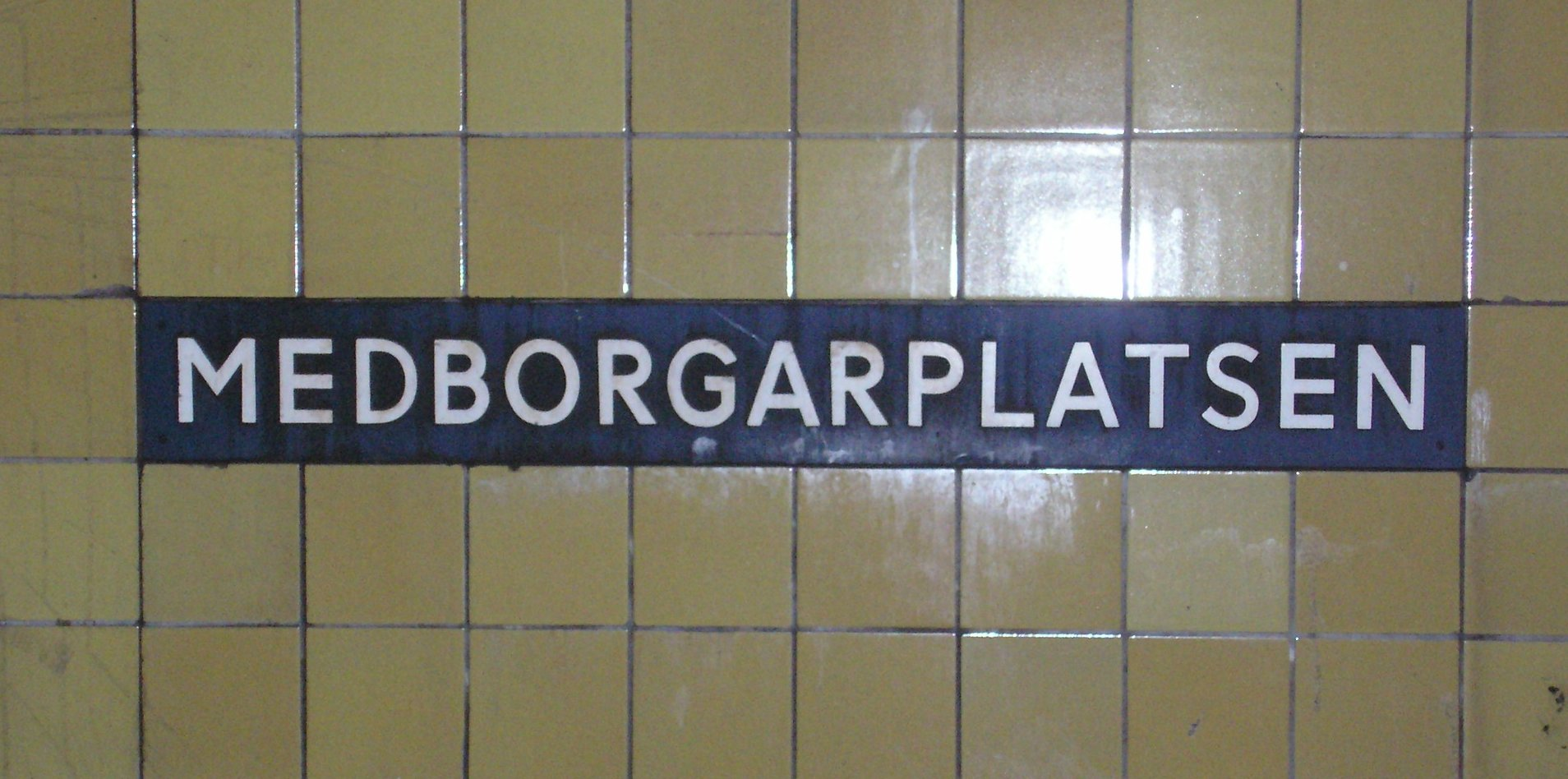 Sign in Medborgarplatsen metro station. Written using Esseltub.